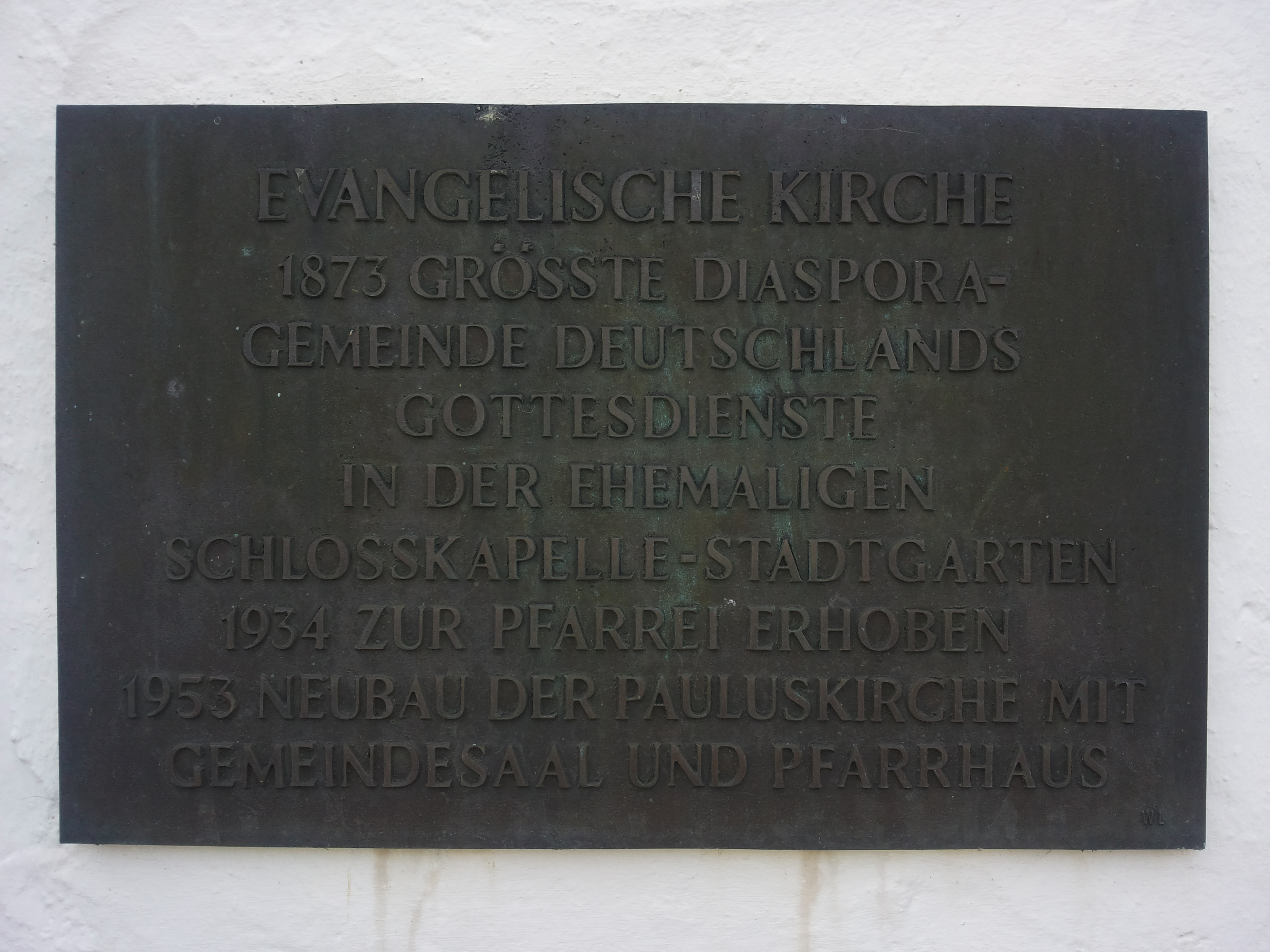 Infotafel an der Pauluskirche (evangelische Kirche) in Bondorf